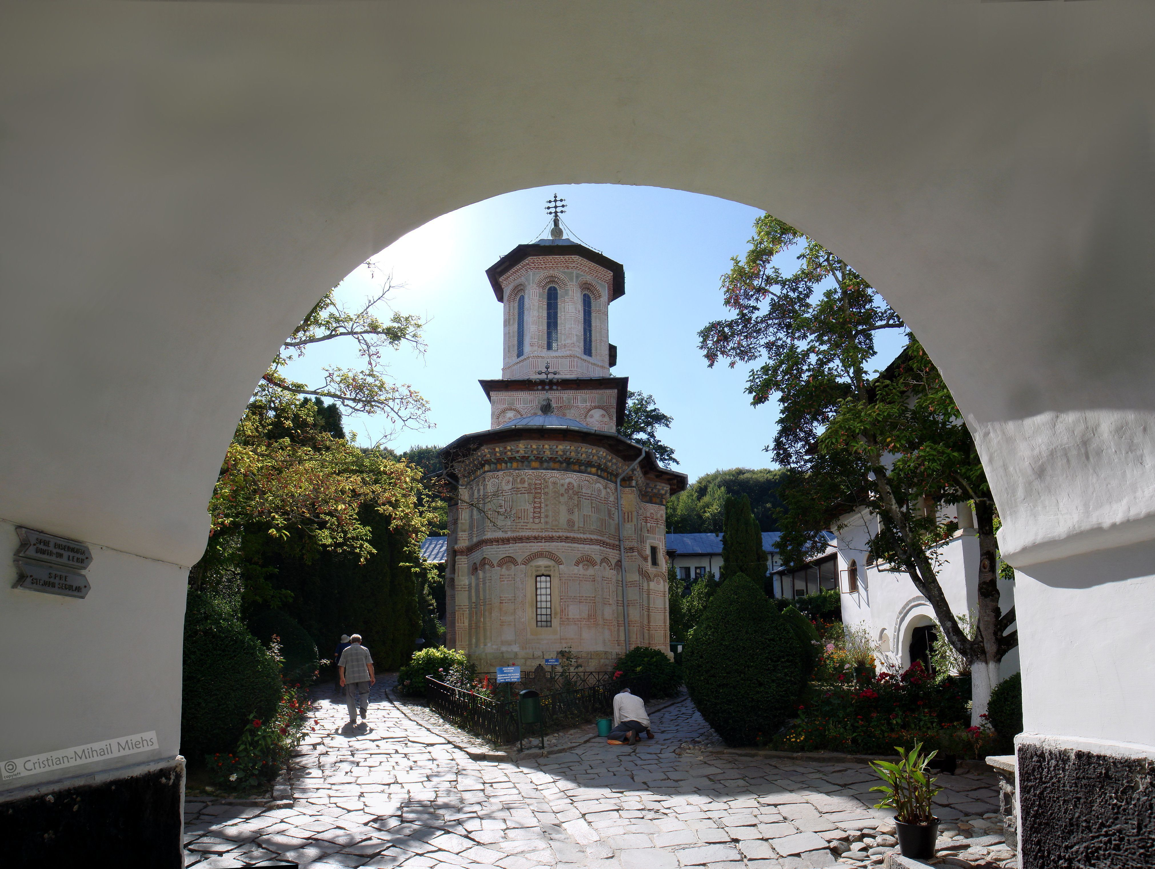 Biserica Nasterea Maicii Domnului a mănăstirii dintr-un lemn 01